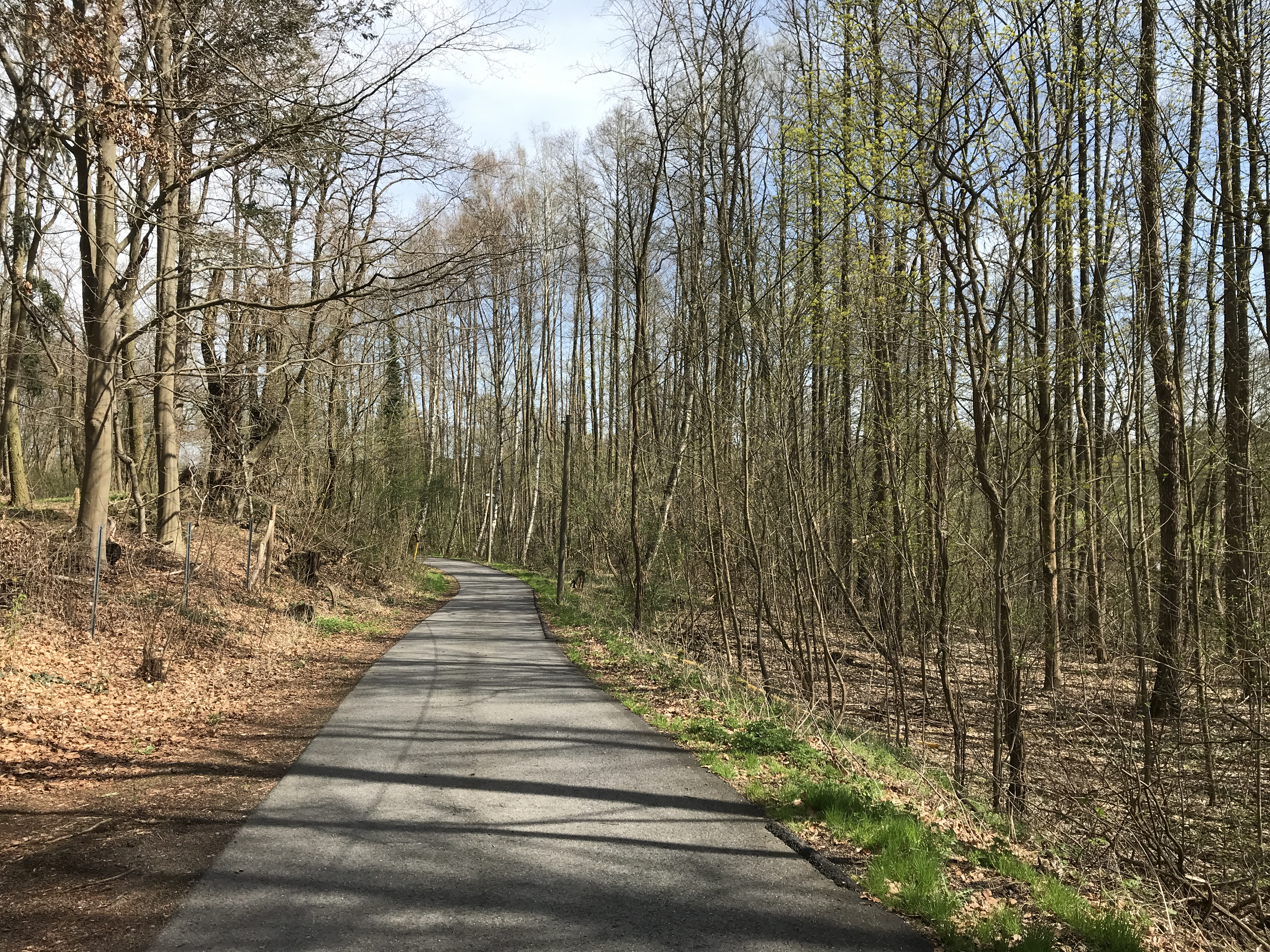 Dahme-Radweg, 123km lange Verbindung entlang der Dahme in Brandenburg